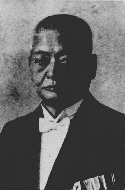 五代目 水野甚次郎